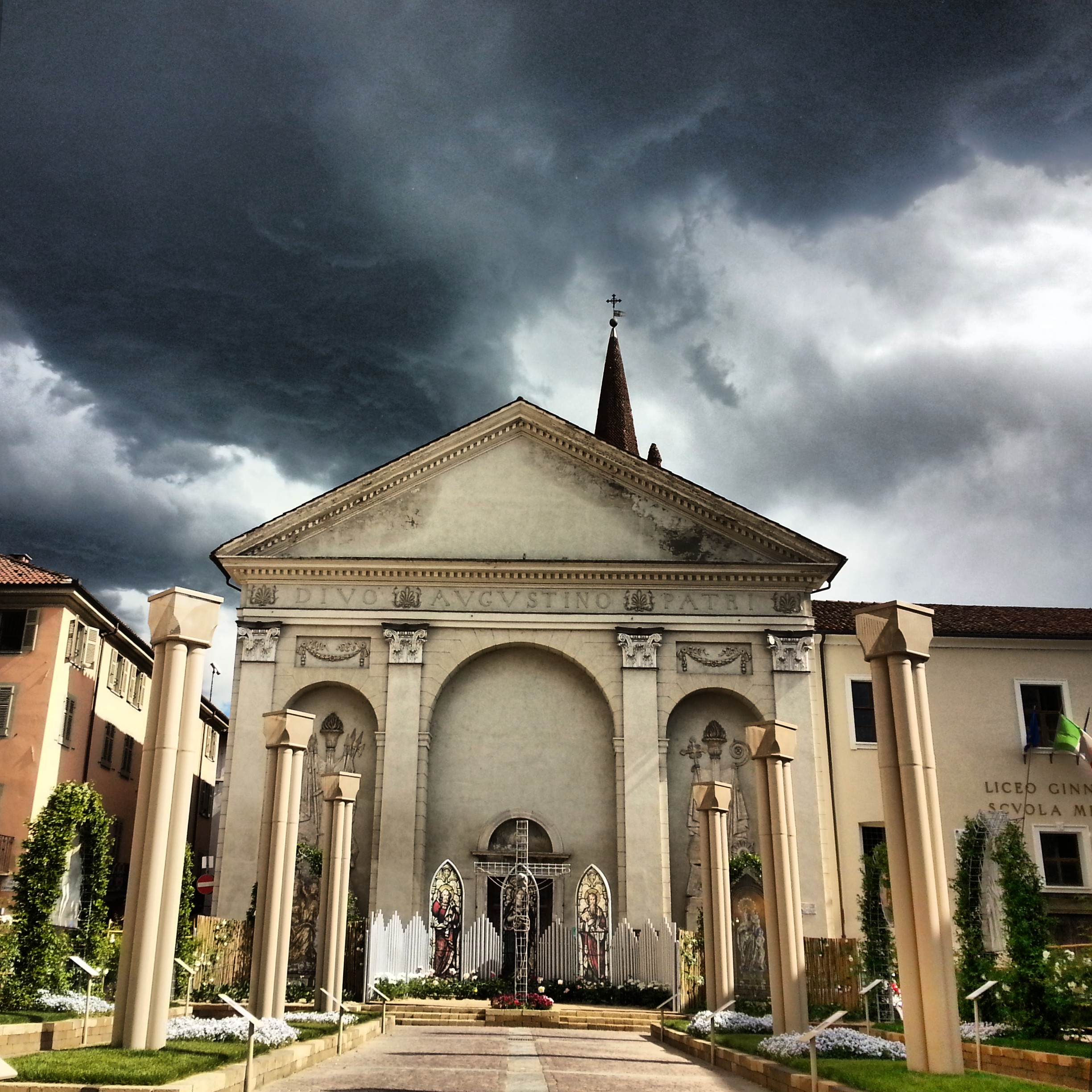 Chiesa di Sant'Agostino con nuvoloni neri This is a photo of a monument which is part of cultural heritage of Italy.